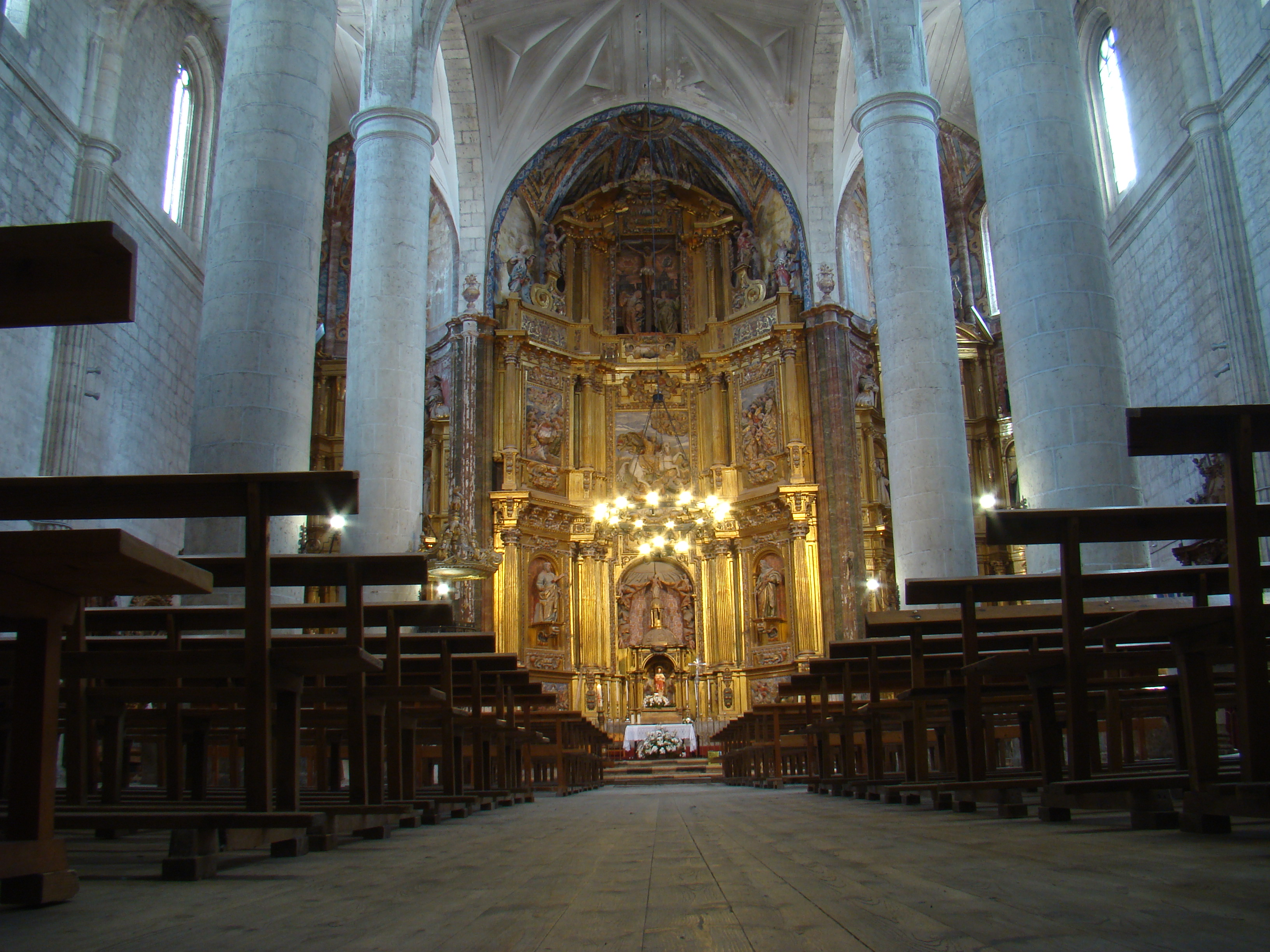 Iglesia de Santiago en la localidad española de Cigales, Valladolid. Interior del templo y al fondo el retablo mayor.